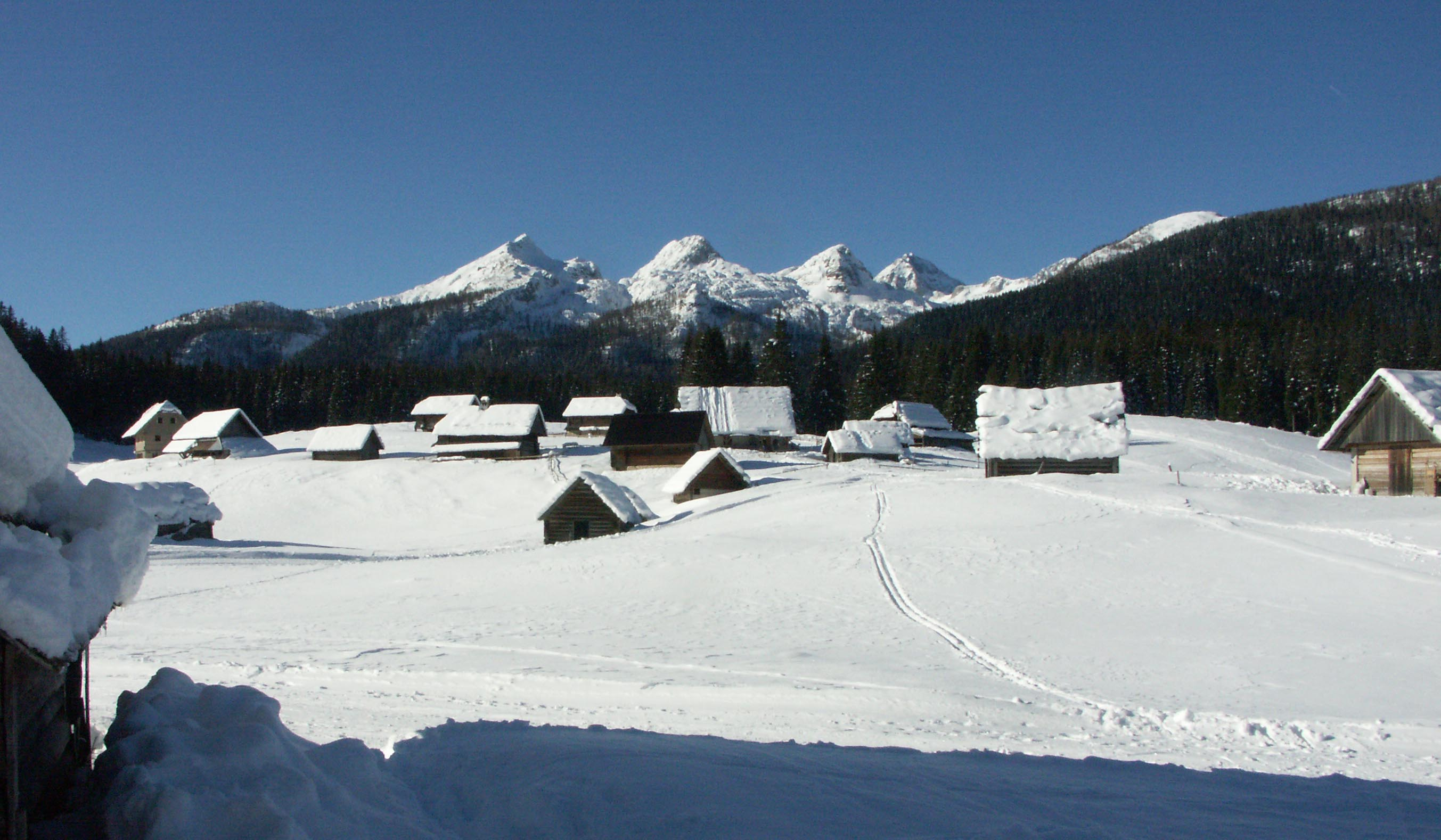 Javorniška planina at Pokljuka, Slovenia (Julian Alps) photo:Ziga 09:33, 13 April 2007 (UTC)